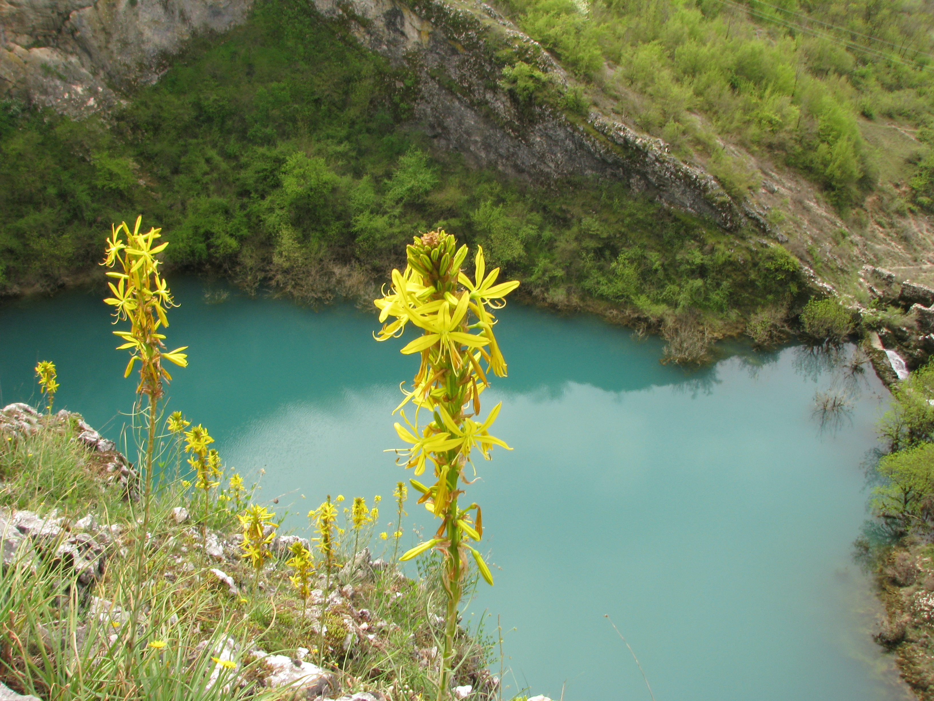 PUP007 Područje upravljanja staništem Fatničko polje. Fotografija prikazuje izvor Obod koji se nalazi, kako mu i ime kaže, na obodu Fatničkog polja. Područje značajno za očuvanje brojnosti i raznovrsnosti brojnih ptičijih vrsta, pogotovo u zimskim mjesecima.